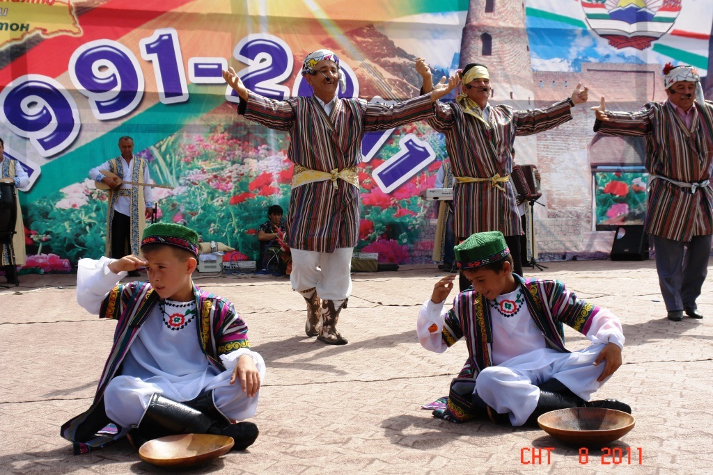 Тоҷикӣ: Рақси мардона, Наврӯз (Ҳиссор, Тоҷикистон)